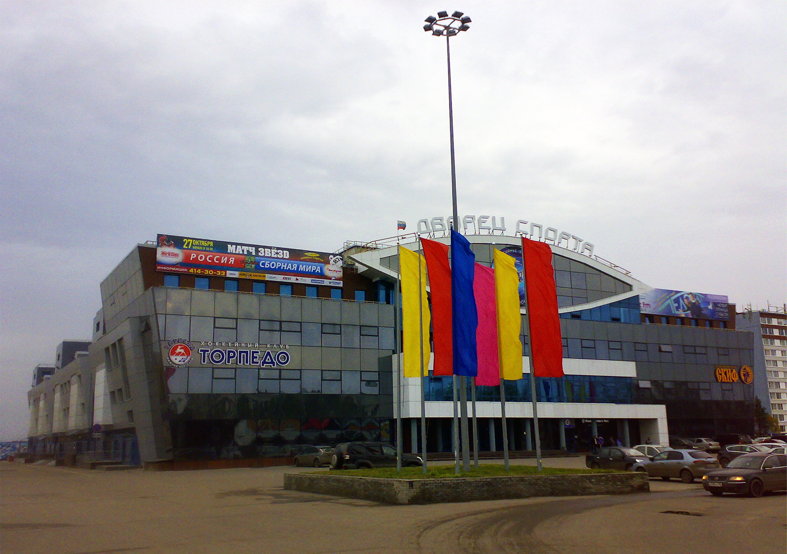 Нагорный дворец спорта